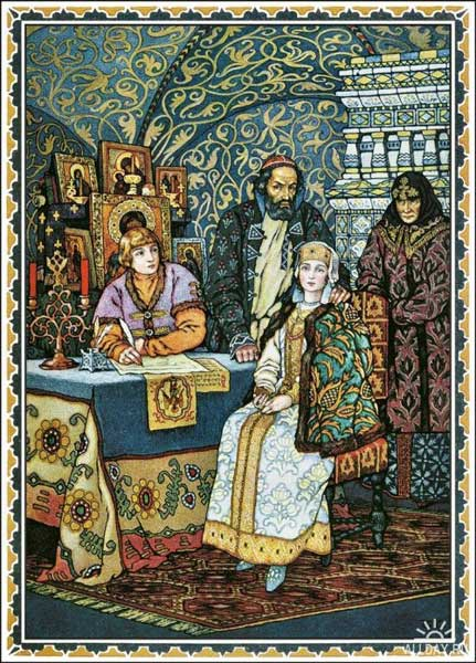 Борис Годунов со своей семьей. Худ. Б. Зворыкин. 1910-е гг